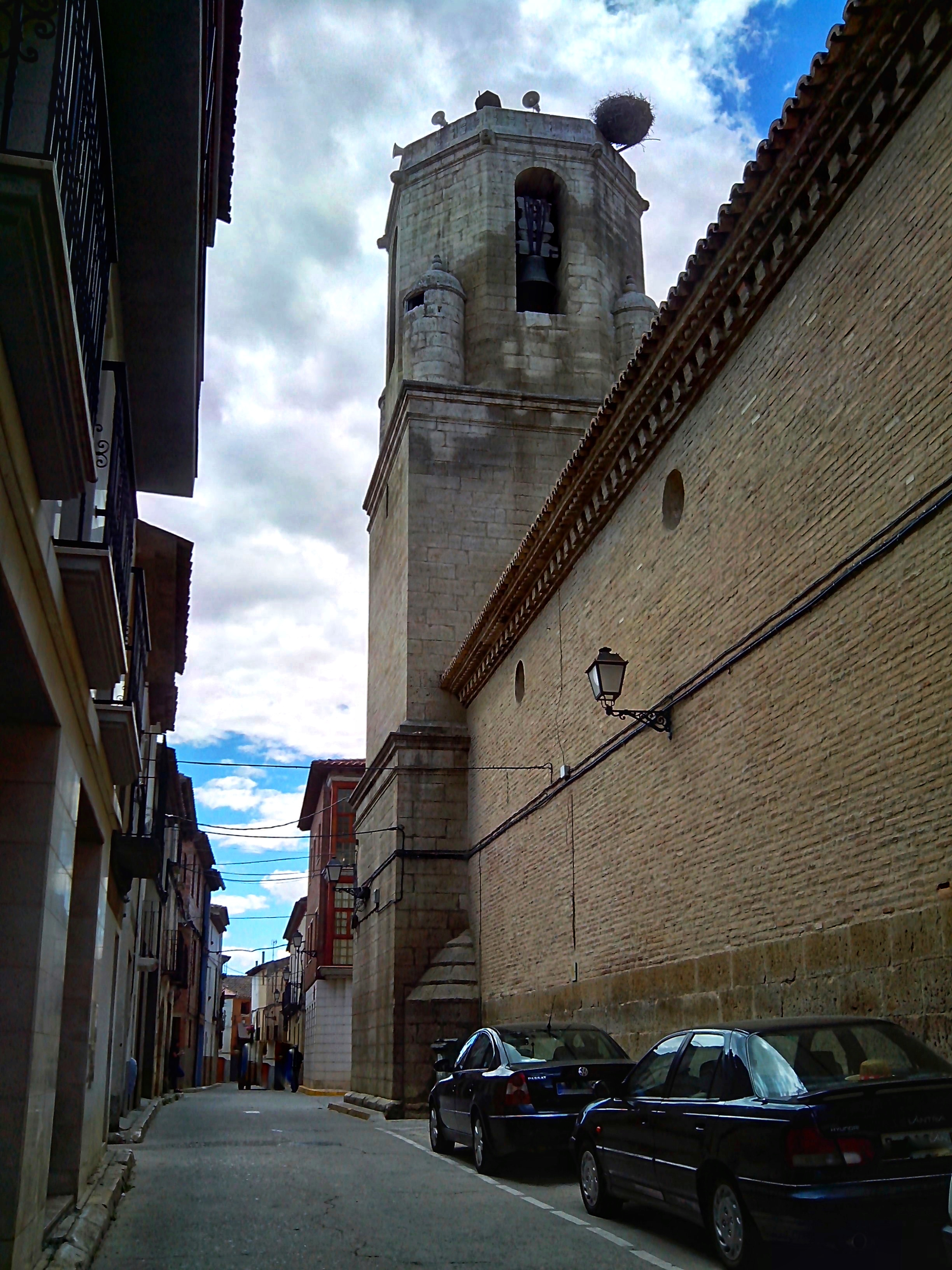 Belver de Cinca